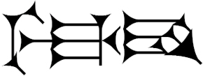 Újasszír összetétel: tamkāru